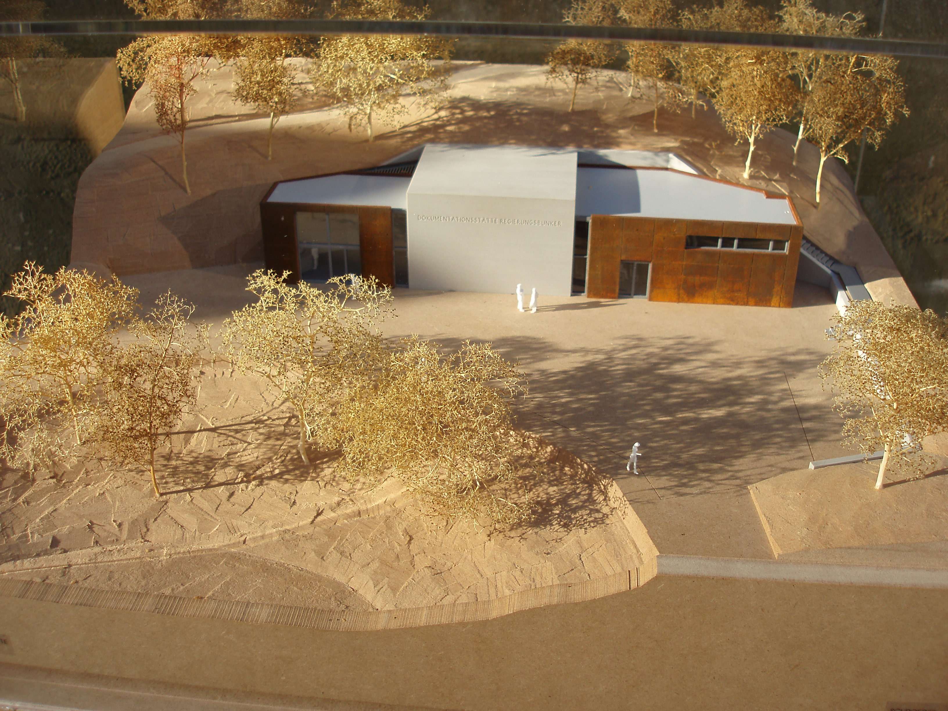 Das Modell zeigt die geplante Außenfassade des Bunkermuseums, zu dem der ehemalige Regierungsbunker im Ahrtal umgewandelt werden soll. Der durch das Ahrtal führende Rotweinwanderweg soll dann umgeleitet werden, so daß er an dem Museumseingang vorbei führen wird.